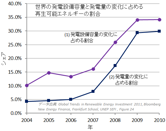 世界の発電設備容量と発電量の変化に占める再生可能エネルギーの割合 data source: Global Trends in Renewable Energy Investment 2011, Bloomberg New Energy Finance, Frankfurt School, UNEP SEFI, Figure 24